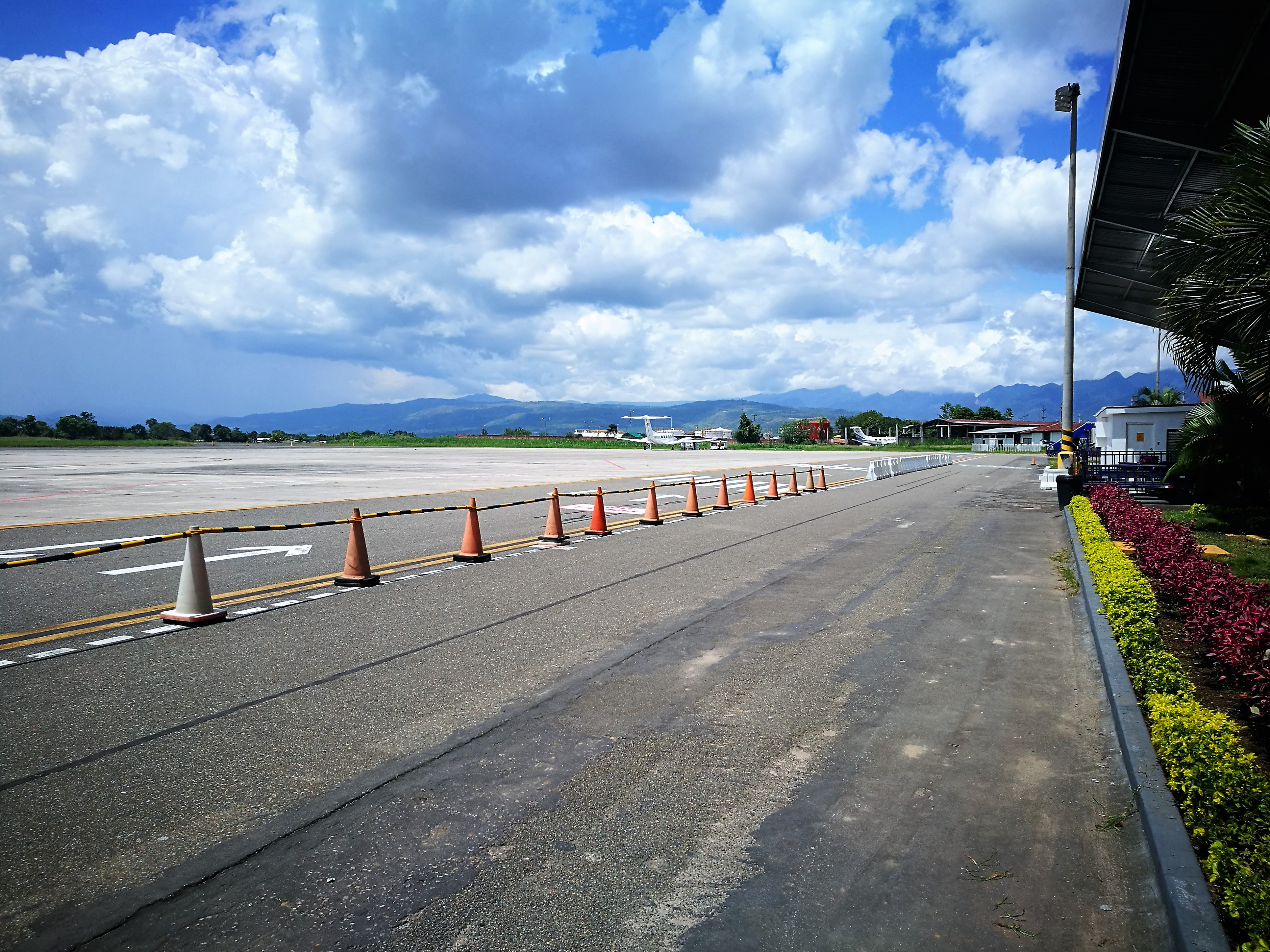 Zona de pistes de l'Aeropuerto Cadete FAP Guillermo del Castillo Paredes de Tarapoto